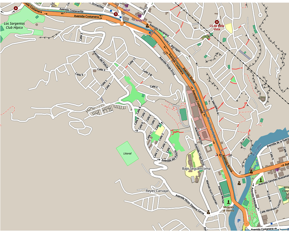 Mapa de la zona de Seguencoma en OPenStreetMap en enero de 2019